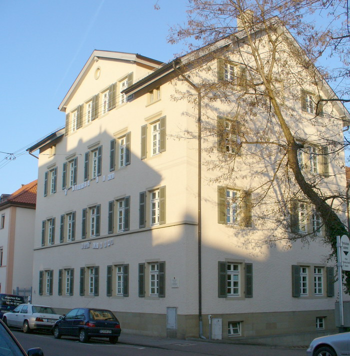 Stuttgart Cannstatt Wilhelmstrasse 10 Altes Amtsgericht mit Wilhelm Ganzhorn Gedenktafel self made photo by user:Enslin at 8 JAN 2006 in Stuttgart-Bad Cannstatt